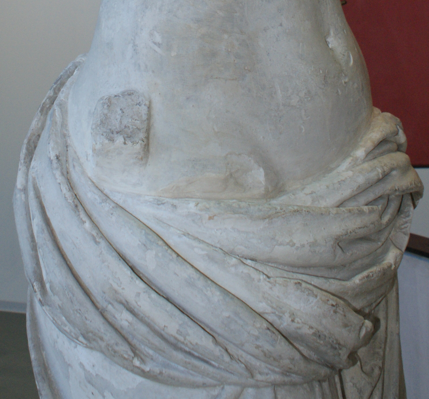 Détail (tenon) de la copie de la Vénus d'Arles en plâtre dans son état originel, sans bras, avant sa modification par François Girardon, exposée au Musée de l'Arles Antique.